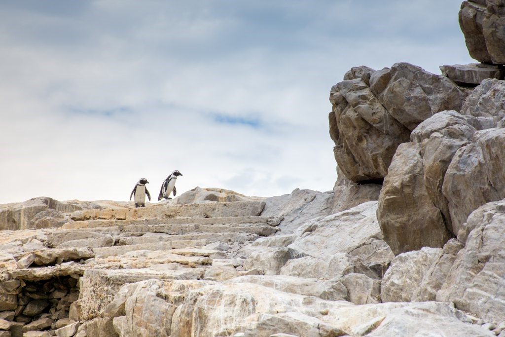 pinguinparkedo